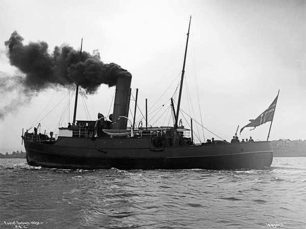 D/S Isbjørn (b. 1894, Akers Mekaniske Verksted, Christiania)